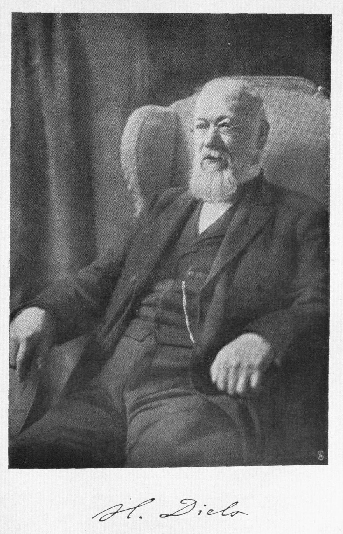 Hermann Alexander Diels (1848–1922)